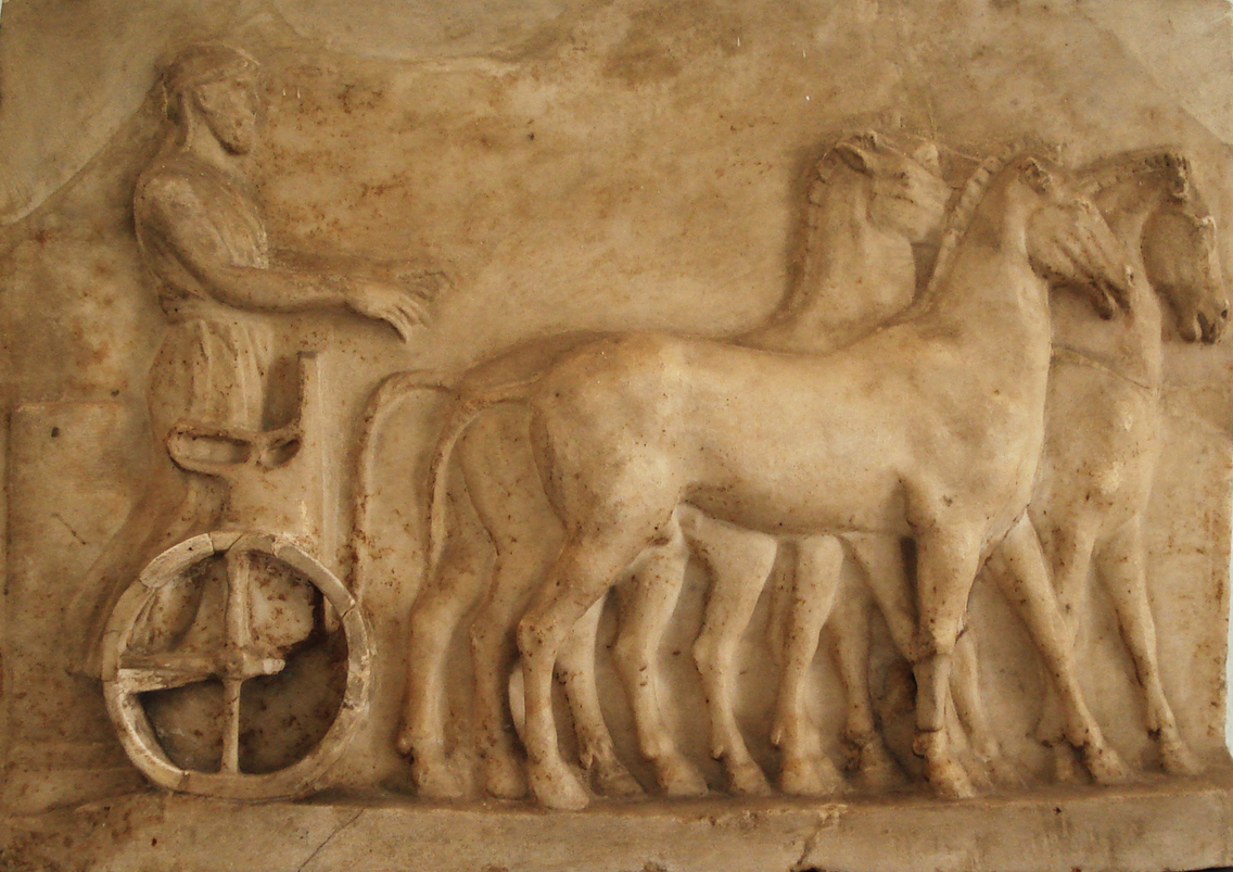 Carro da guerra antico V secolo a.C. Immagine originale: qui.